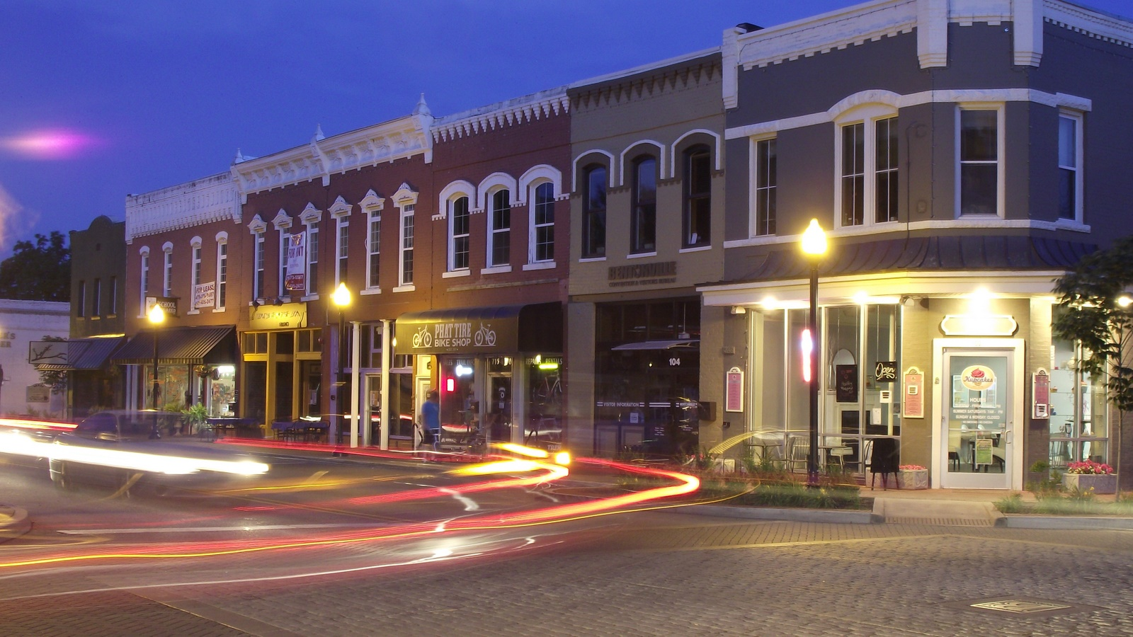 Bentonville, AR Central Avenue at night